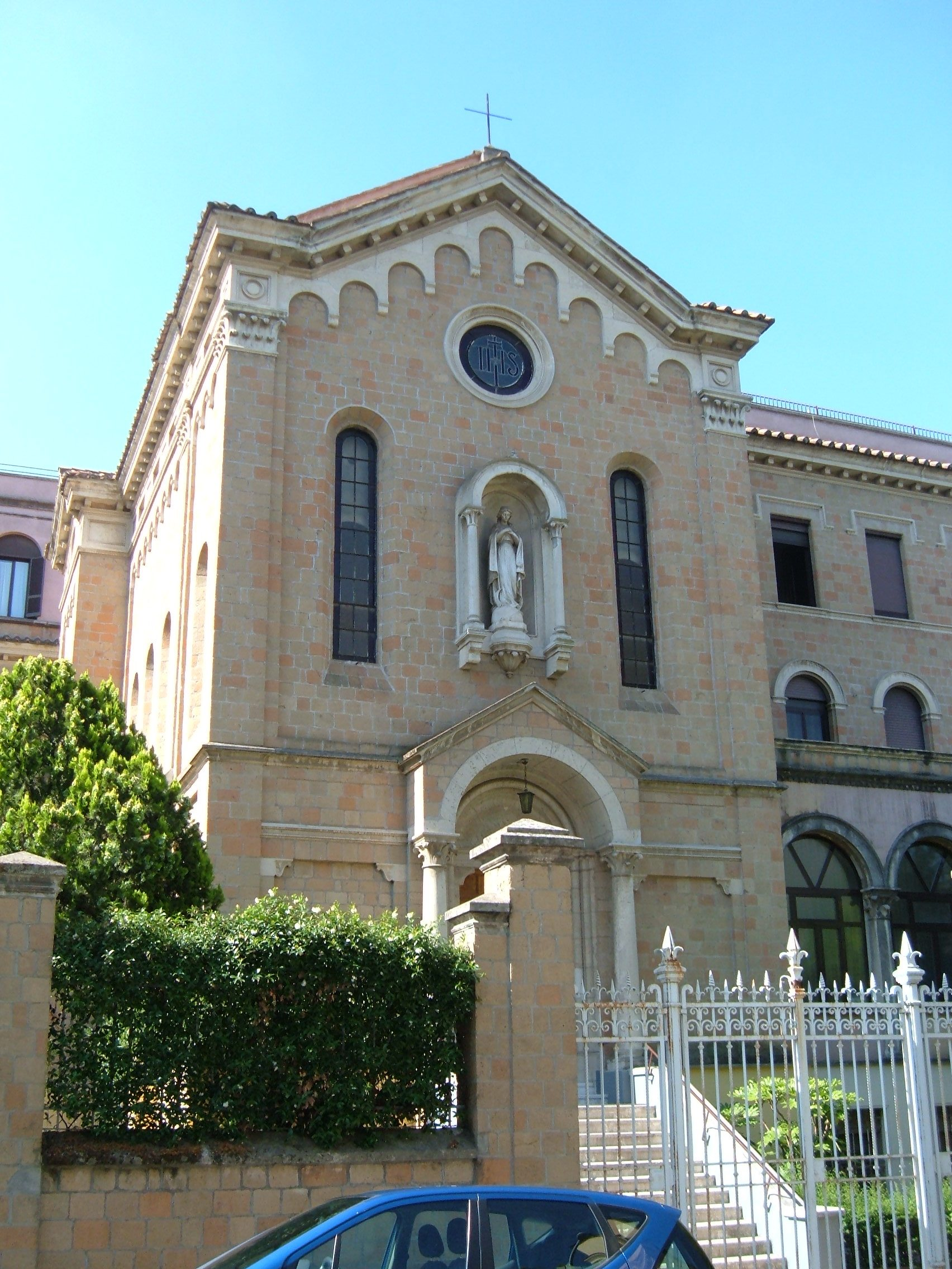 Chiesa del Preziosissimo Sangue, dei Missionari del PIME, a Roma, nel quartiere Gianicolense.